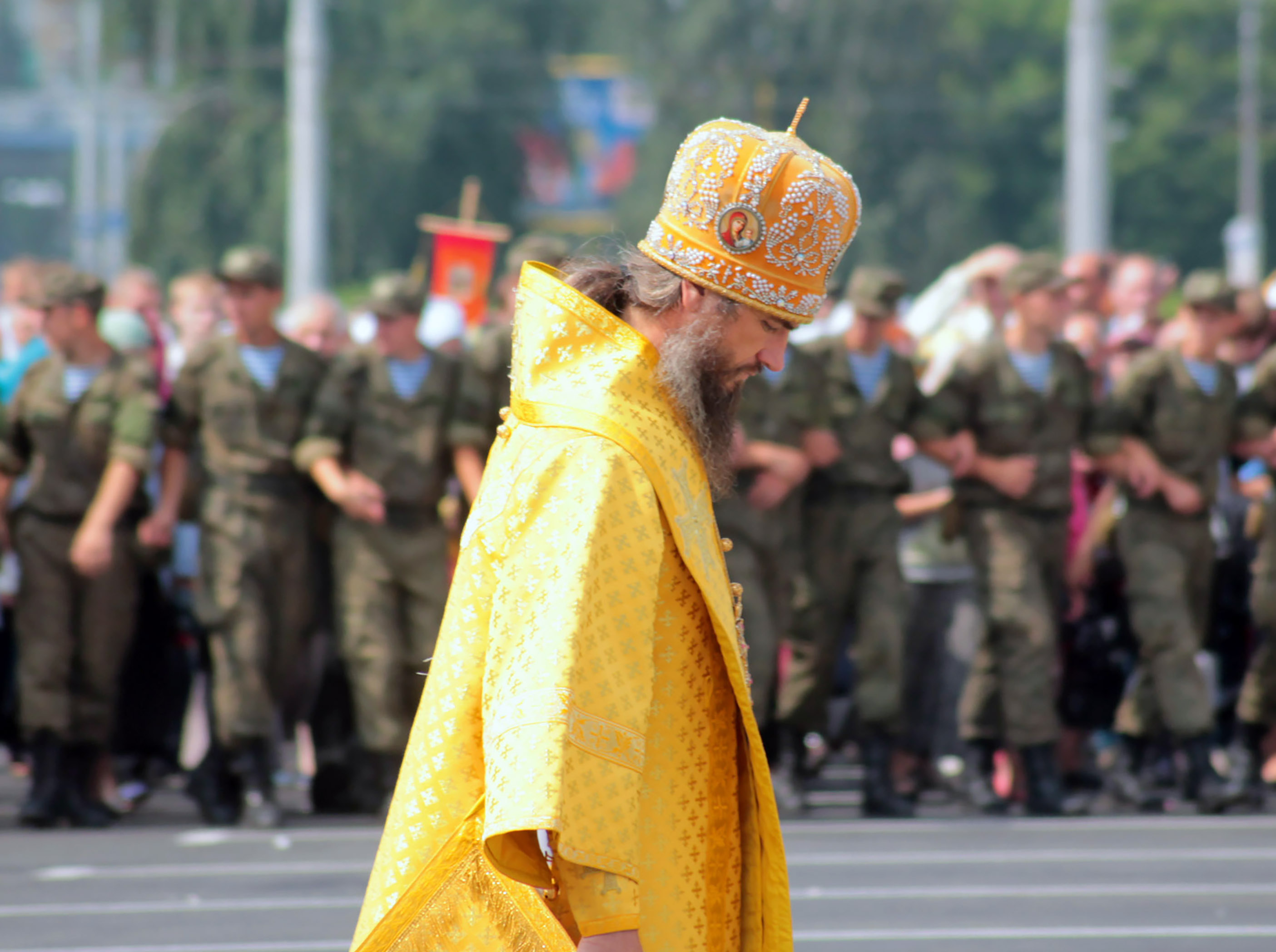 епископ Савватий на празднования Крещения Руси г. Омск